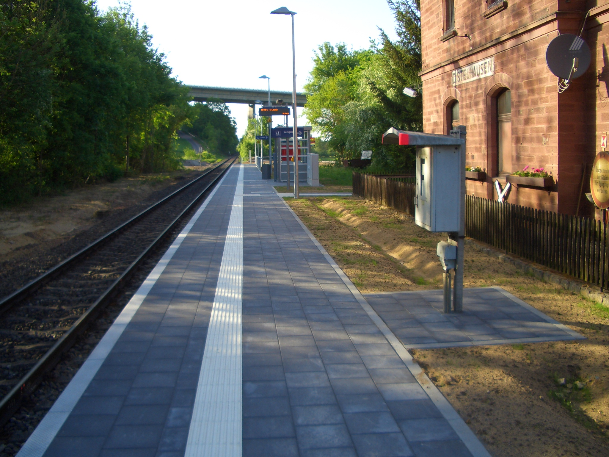 Bahnsteig mit Blick Richtung Tauberbischofsheim